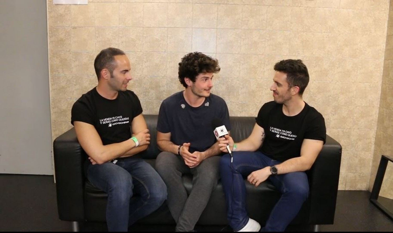 El cantante Miki Núñez durante una entrevista para Eurovision-Spain.